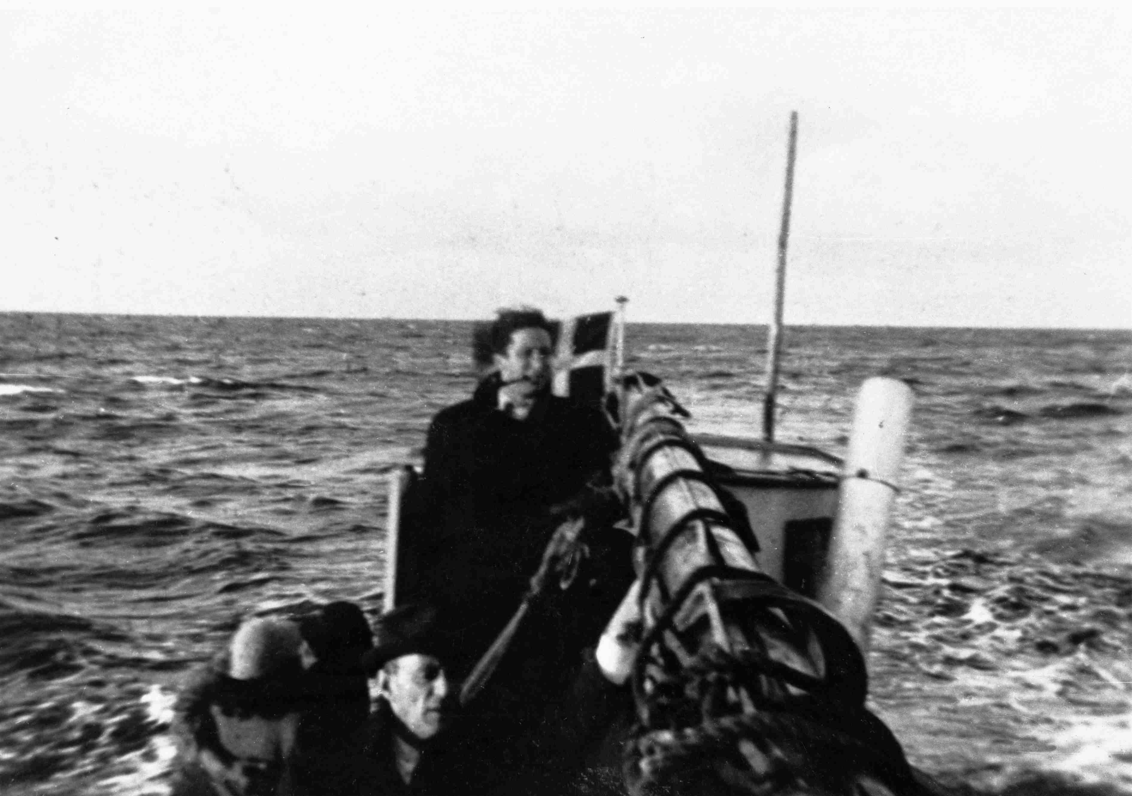 Fotograferet af en af flygtningene. Billedet er uskarpt, og motivet fylder kun den nederste halvdel. De ægte billeder er ofte ikke så teknisk perfekte som rekonstruktioner lavet af professional